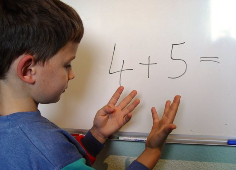 Konkretistisch rechnendes Kind.